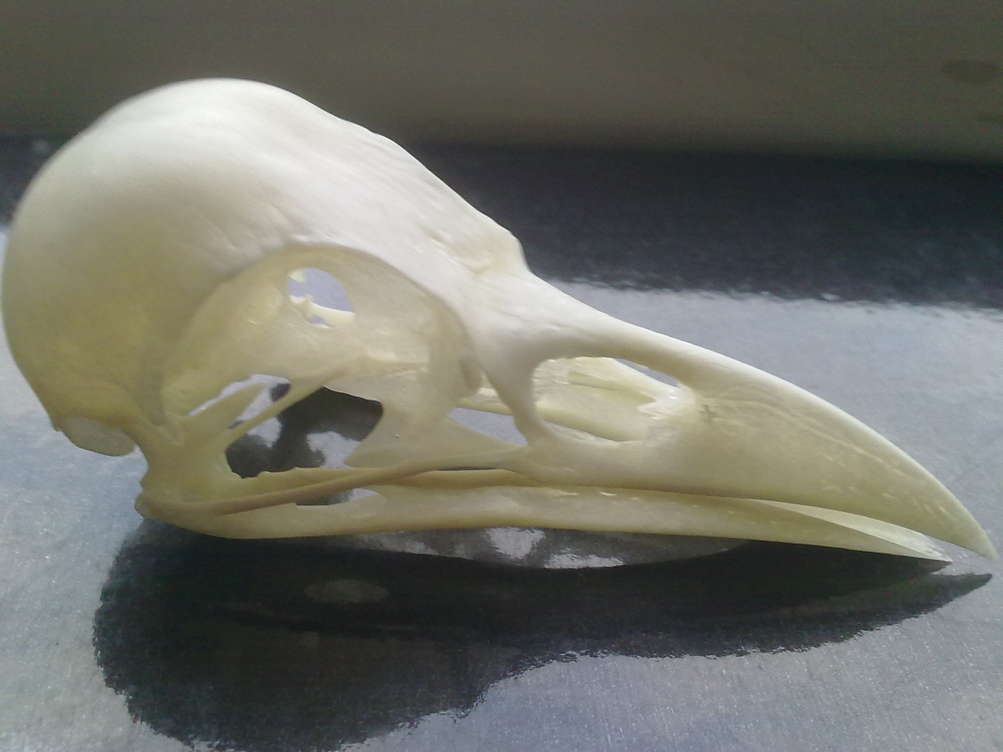 Schädel (Cranium) einer Rabenkrähe (Corvus corone corone). Enzymatisch Mazeriert, chemisch entfettet und chemisch gebleicht.